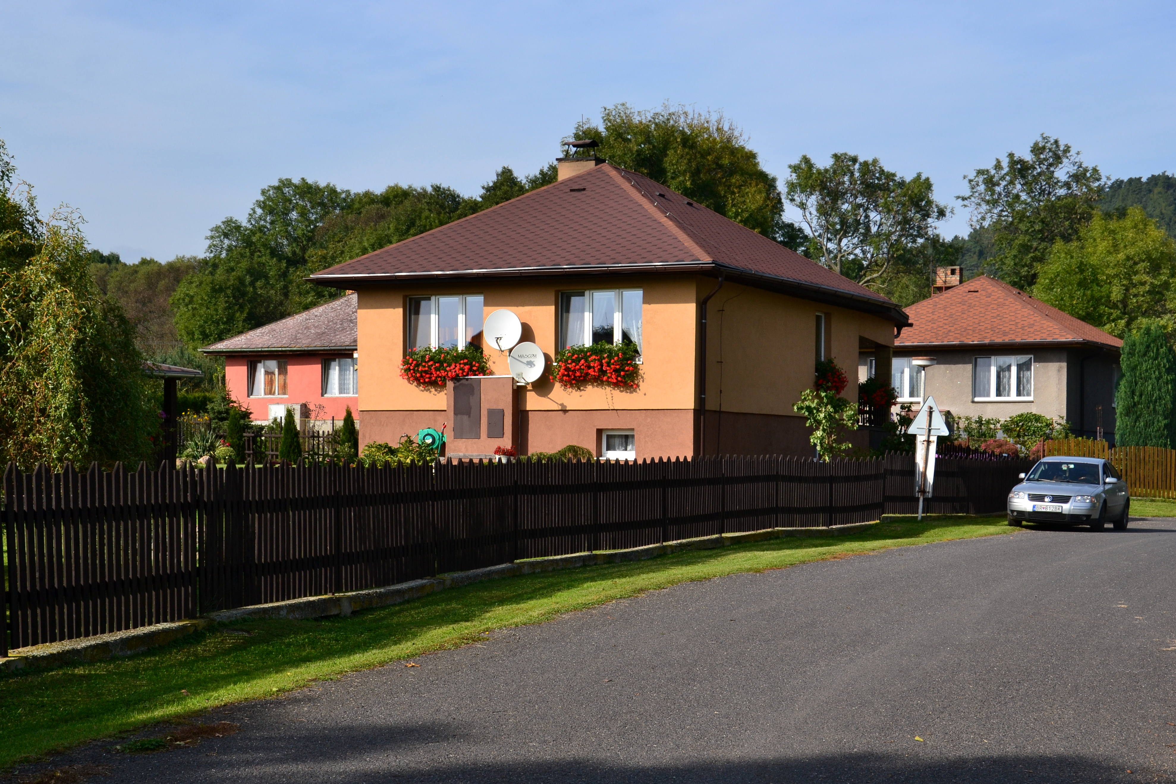 Ždov - domy ze 70. let 20. století